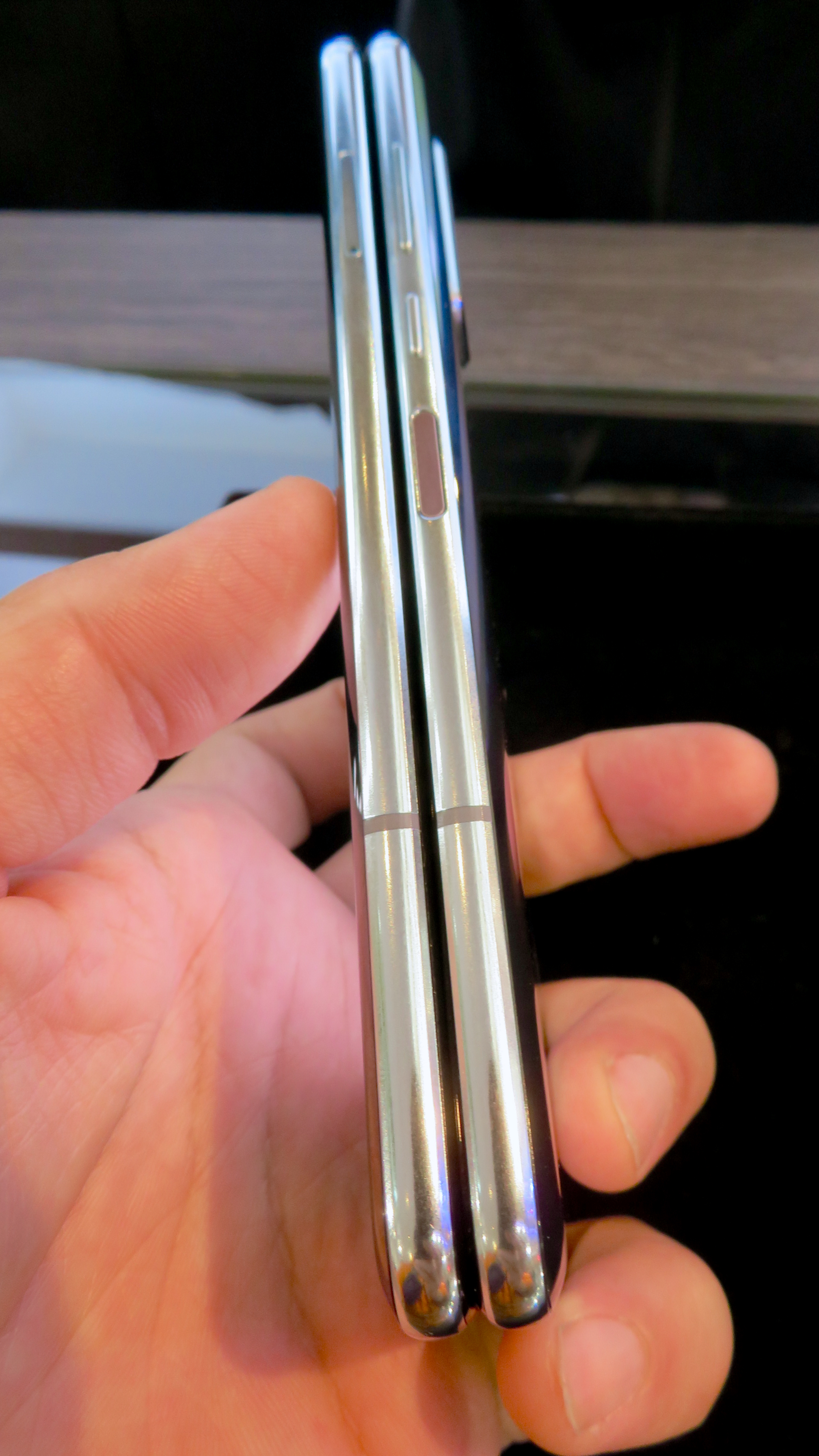 Samsung社の折りたたみ式スマートフォン「Galaxy Fold」。